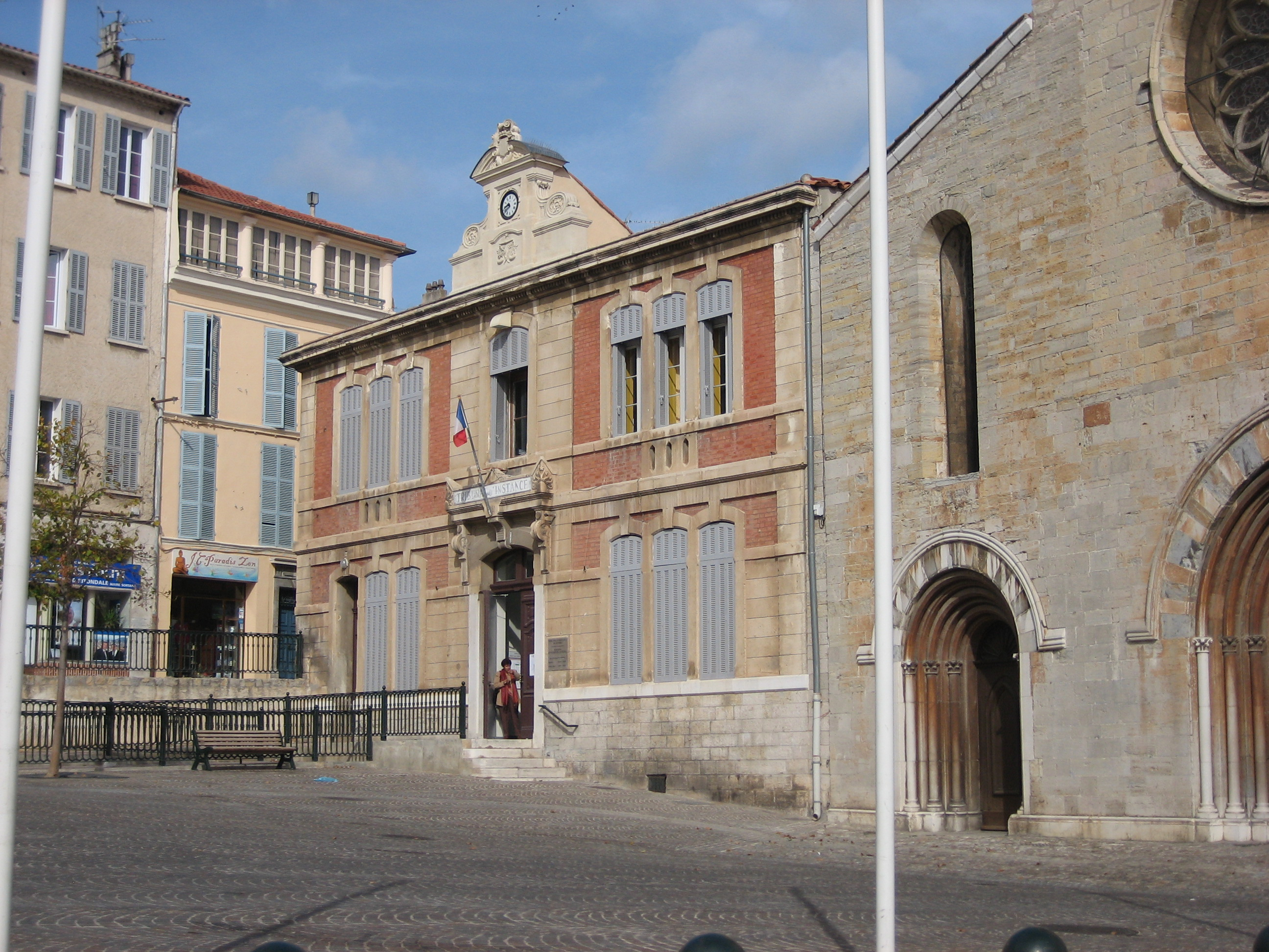 Hyères